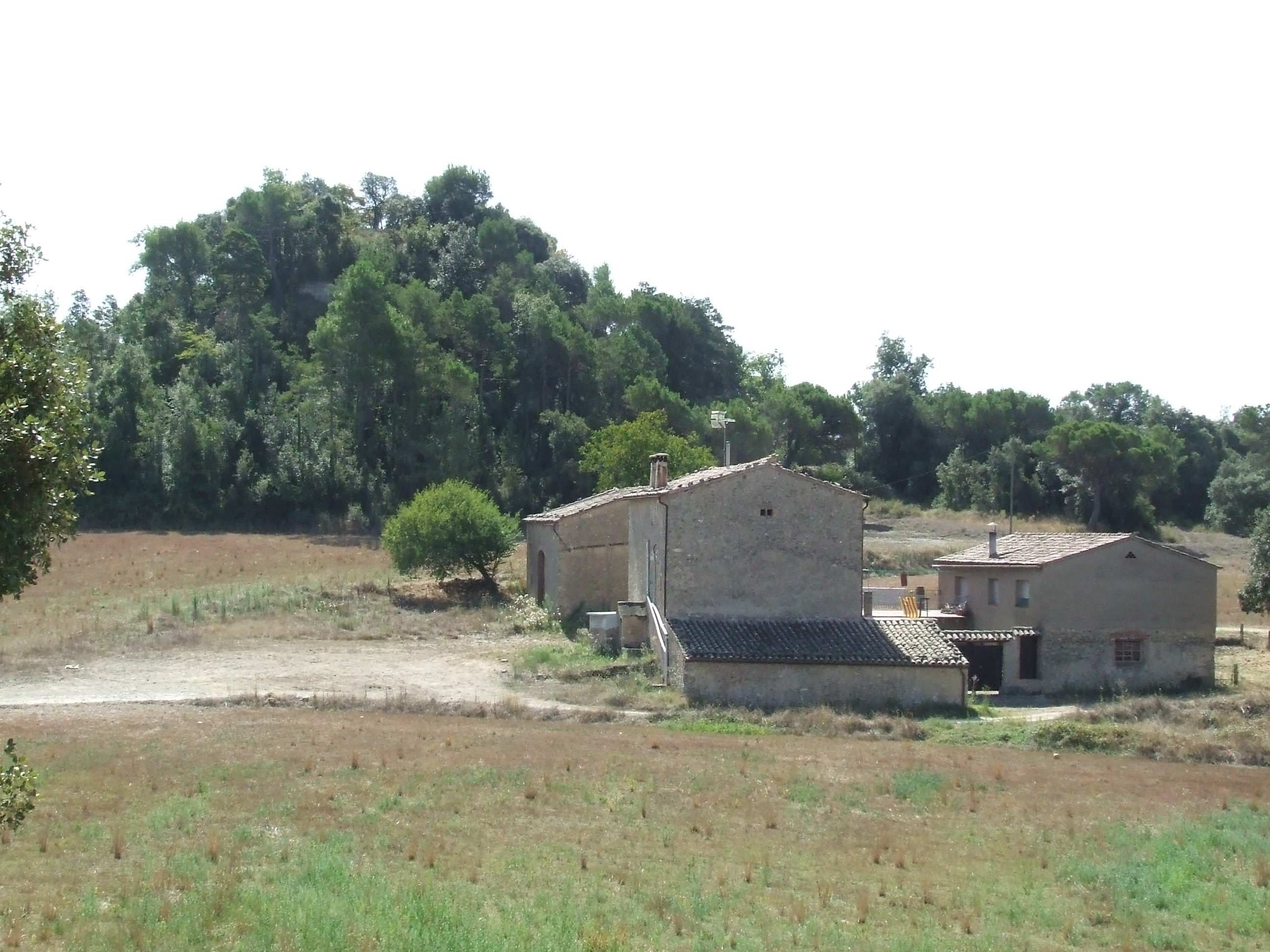 Mas i Turó de Torroella (Castellcir, Moianès)